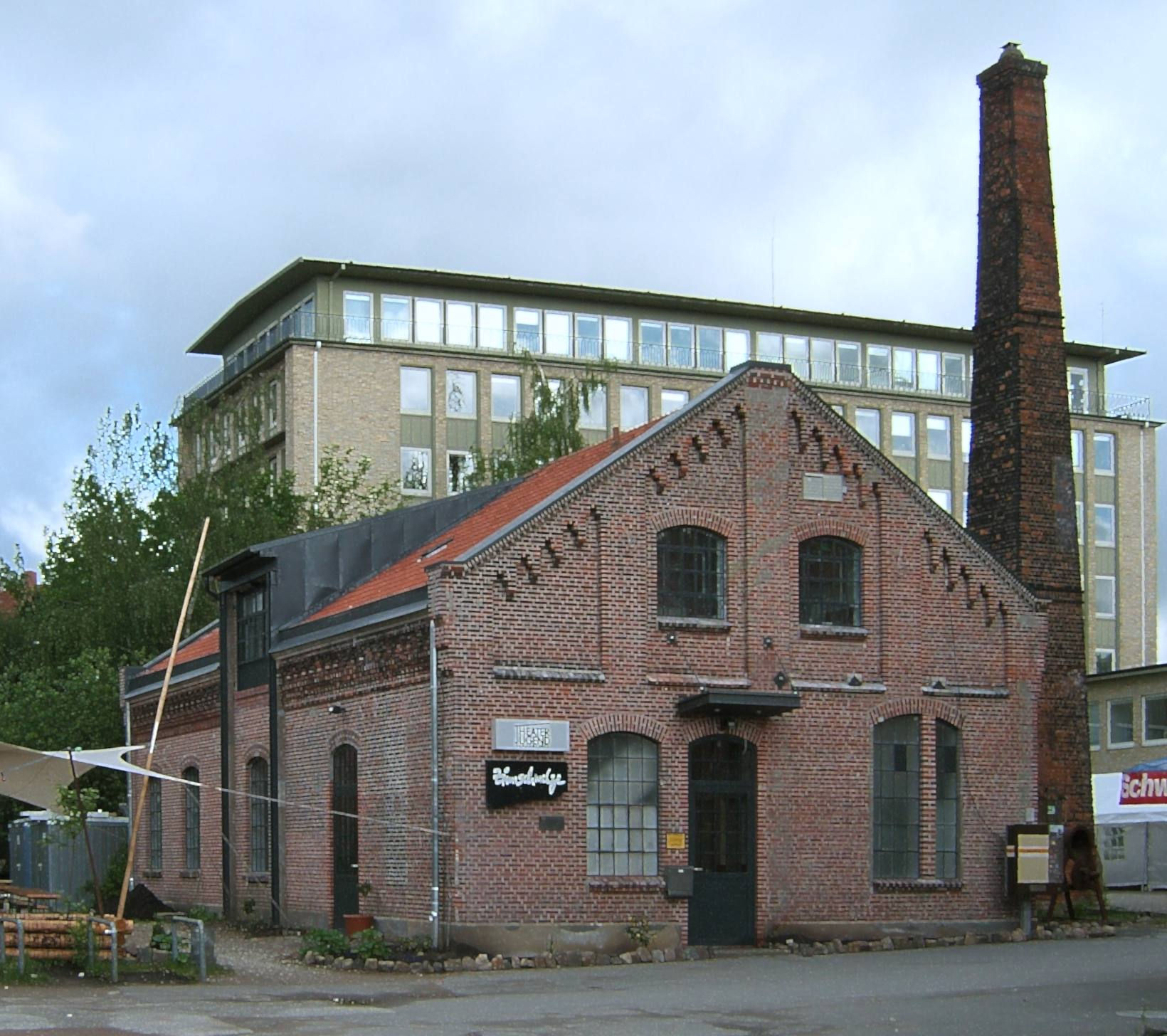 Zinnschmelze auf dem Gelände des Museums der Arbeit This is the photograph of an architectural monument. It is part of the list of cultural monuments of Hamburg, no. 1097